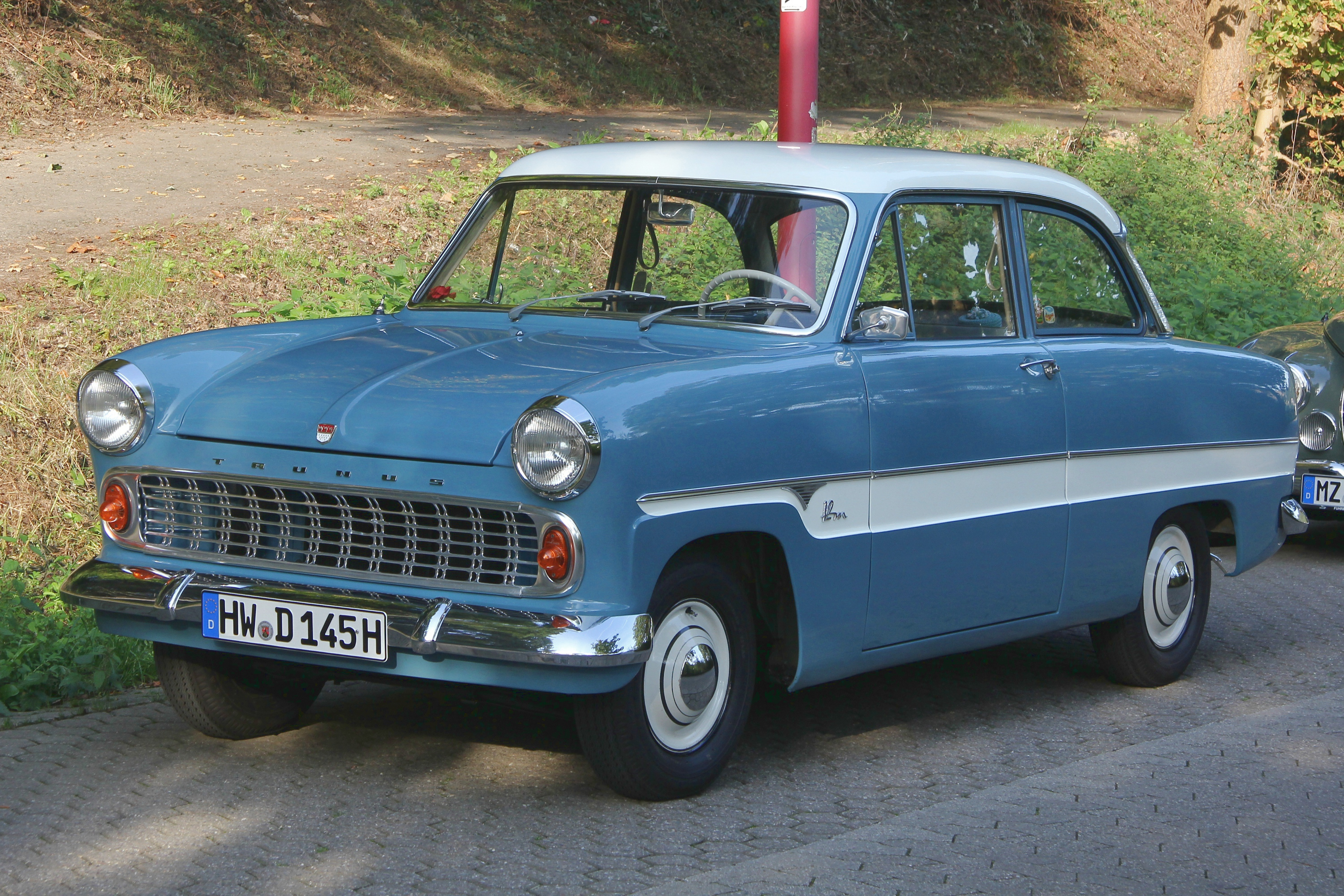 Ford Taunus 12m (P1), Bauzeit 1959 bis 1962, bei der Moselschiefer-Classik in Mayen; Kennzeichen verändert